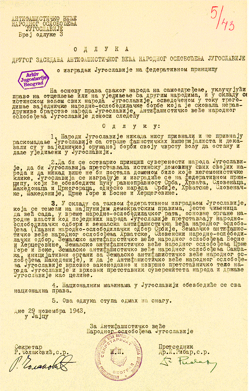 Beschluss der zweiten Sitzung des antifaschistischen Rates der Volksbefreiung Jugoslawiens über die Errichtung Jugoslawiens nach dem föderativen Prinzip. Decision of the II Session of AVNOJ on federalization of Yugoslavia.